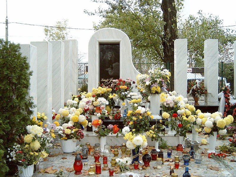 Zámbó Imre (Jimmy) sírja Budapesten, a Csepeli temetőben.